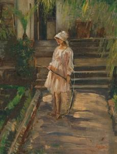 Opera di Filippo Galante (1872-1953), pittore, medaglista e docente, nato a Sora, Italia ed emigrato in Argentina alla fine del secolo XIX.